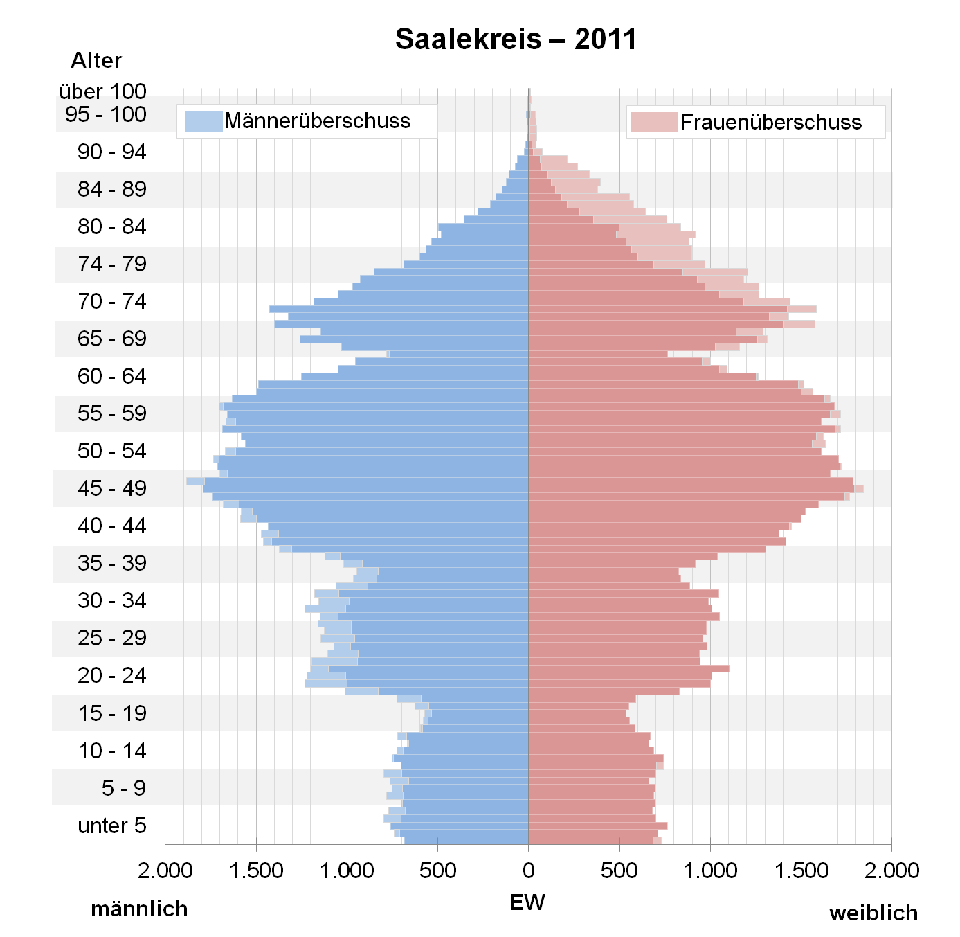 Bevölkerungspyramide des Saalekreises nach Zensus 2011.